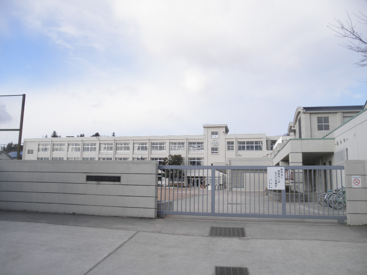 三田市立三輪小学校 正門